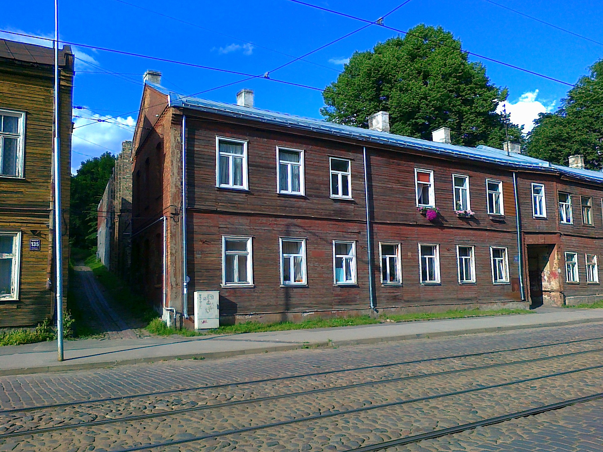 Maskavas priekšpilsēta, Maskačka, Maskavas iela.